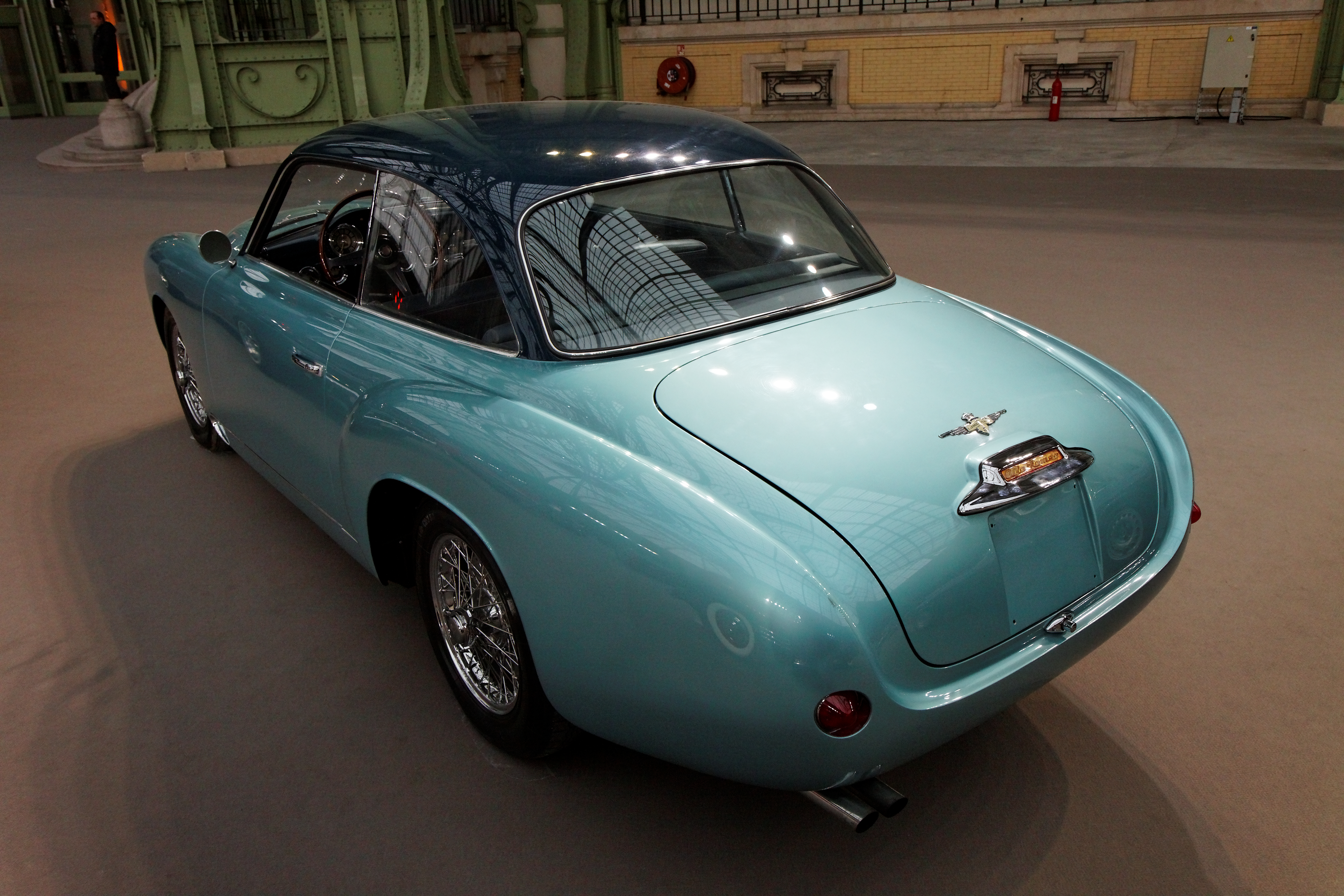 Alfa Romeo 1900 C Super Sprint Touring del 1954, passo corto, motore di cilindrata 1.975 cm3 e cambio a 5 rapporti